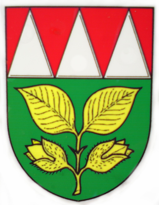 Znak obce Bukovany v okrese Olomouc